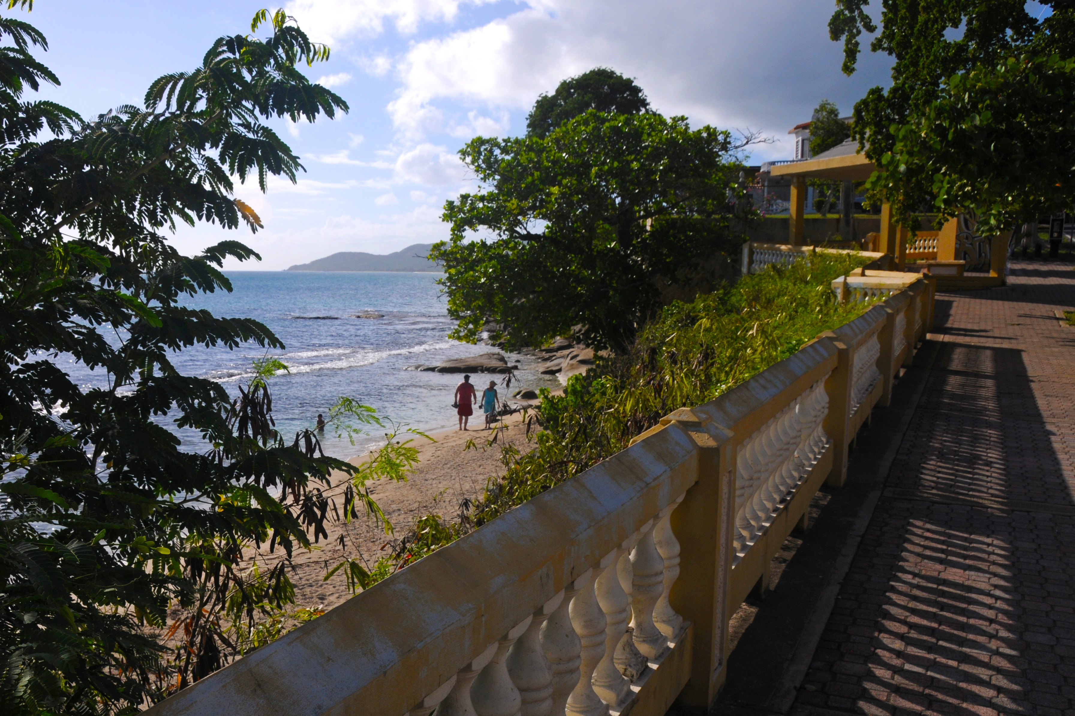 Calle Flamboyant, Esperanza, Vieques, Puerto Rico